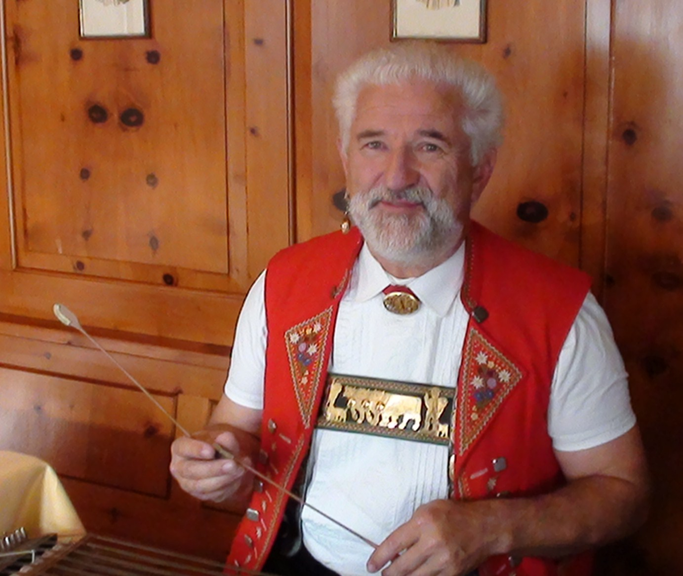 Der Appenzeller Volksmusikant Walter Alder (aus der Alderdynastie) am Hackbrett.